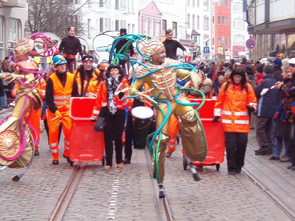 Sambagruppe des Bremer Karneval 2007